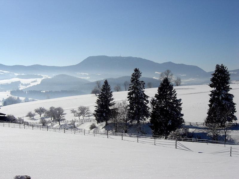 Verschneite Landschaft